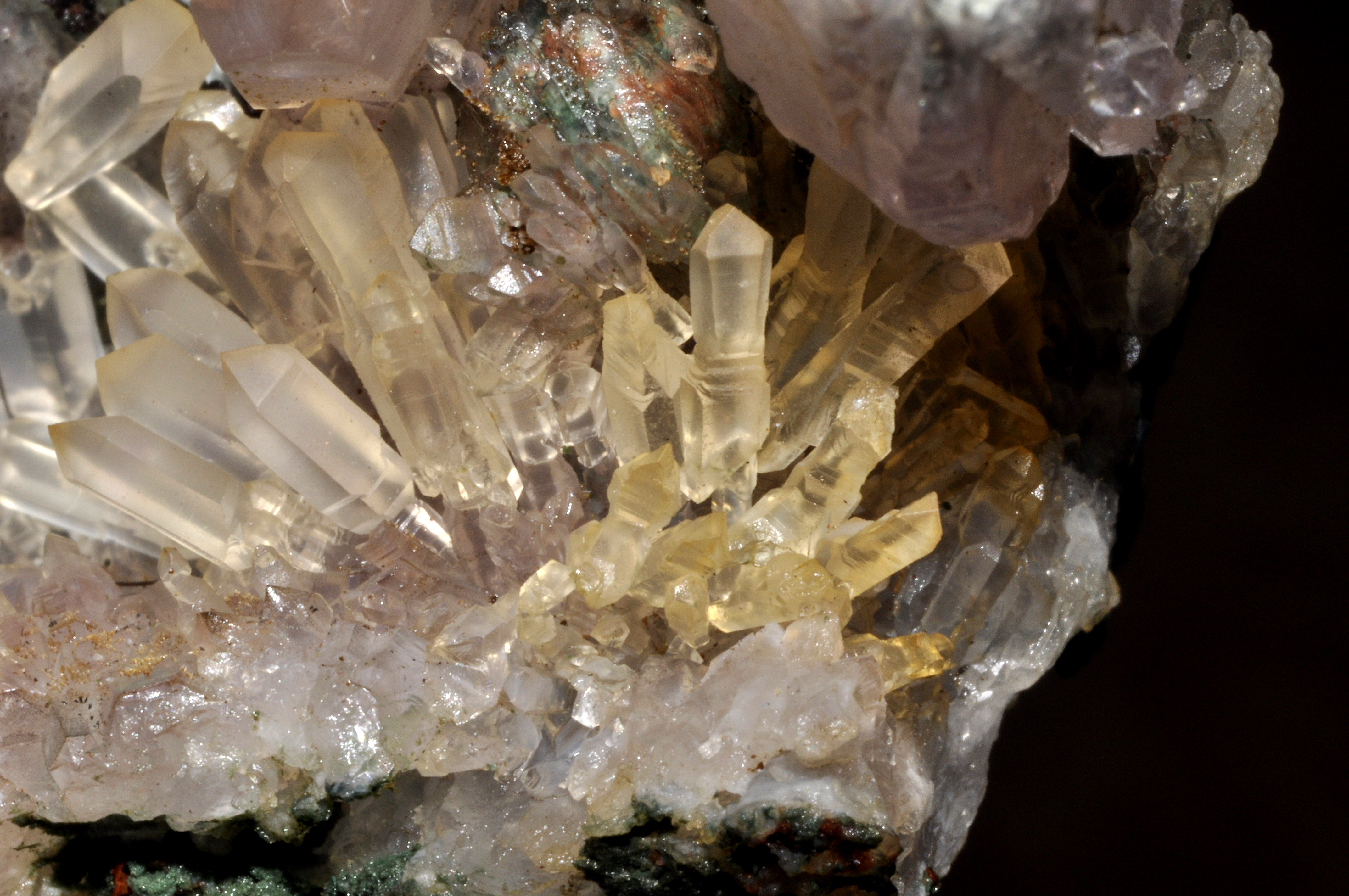 Eventail de sceptres de Quartz